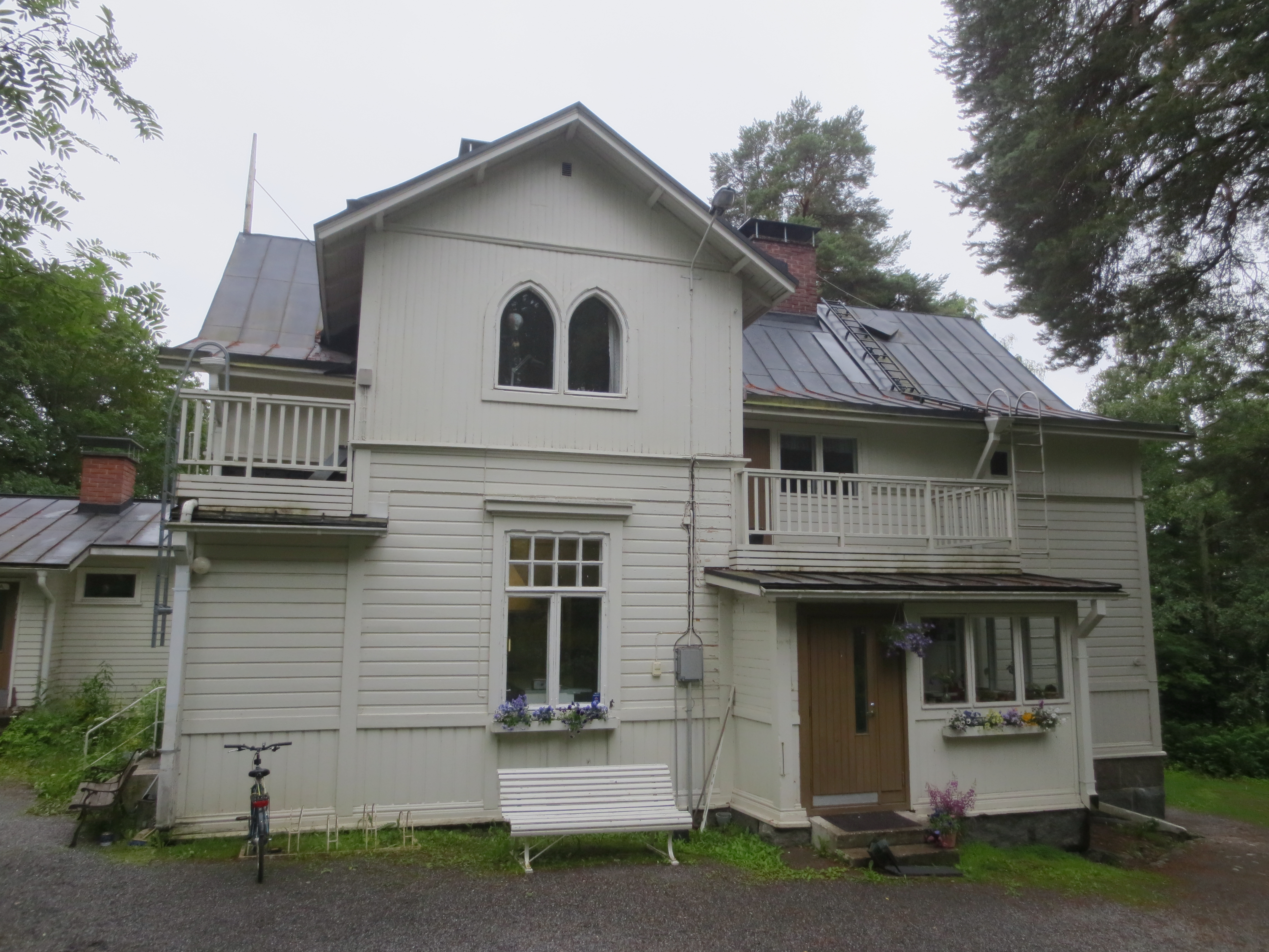 Tahmelan huvila Tahmelassa Tampereella